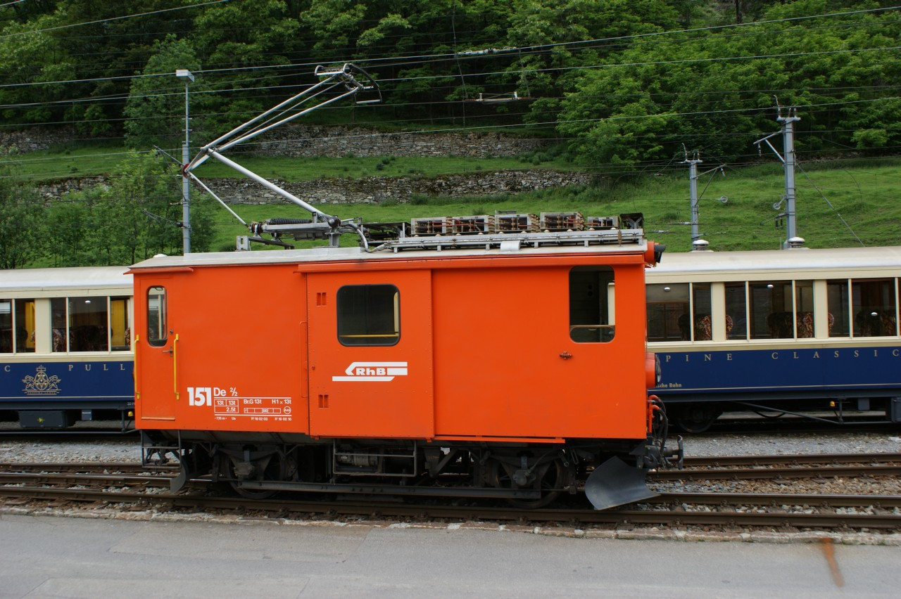 RhB De 2/2 151 als Rangierlok in Poschiavo.